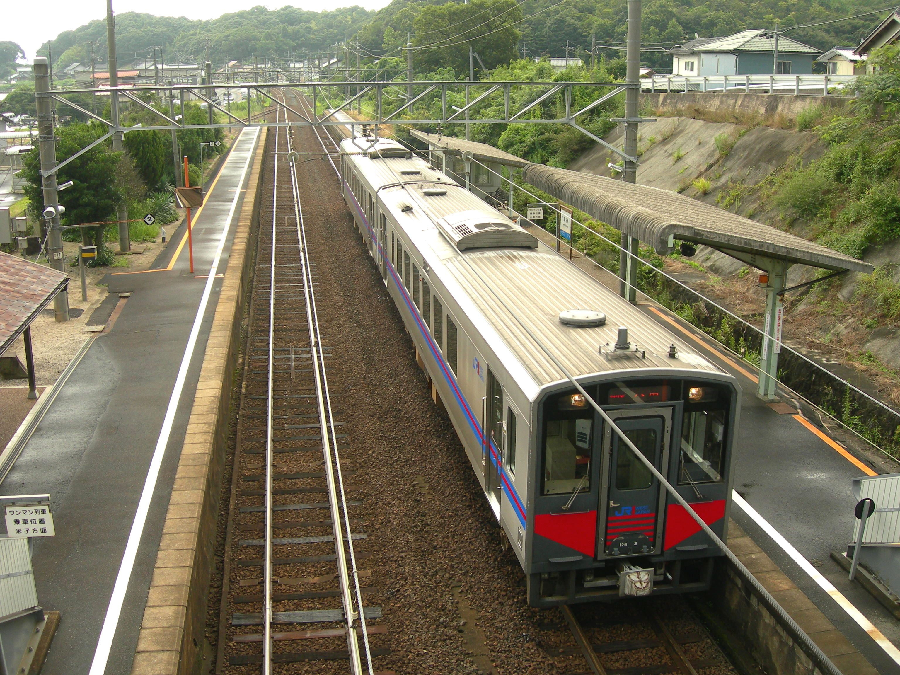 来待駅ホーム